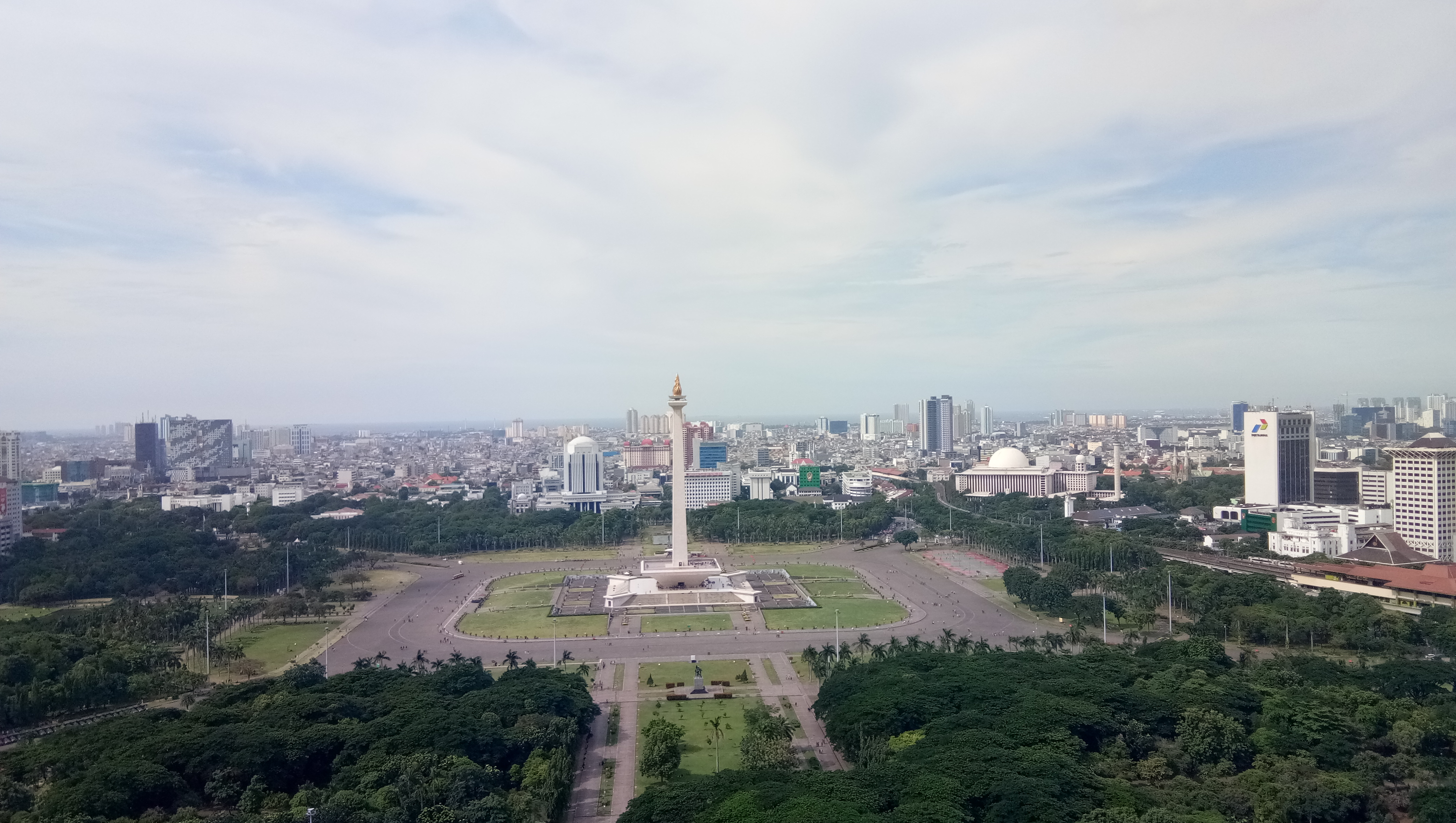 Monumen Nasional dilihat dari salah satu gedung di Jakarta